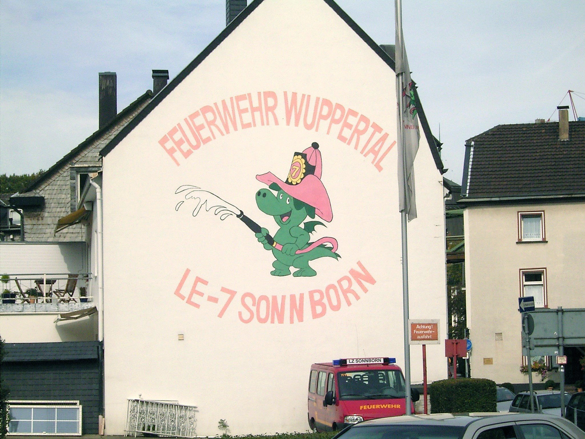 Wandgemälde mit dem „Feuerwehrdrachen“ Grisu (Feuerwehr Wuppertal, kleine Wache Sonnborn)